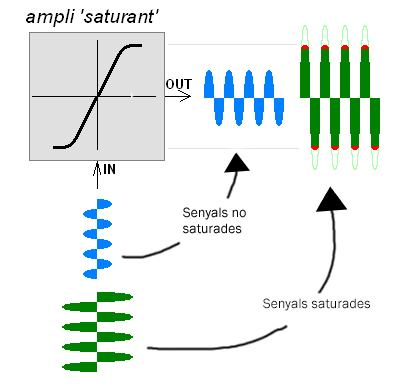 Descripció de les senyals saturades